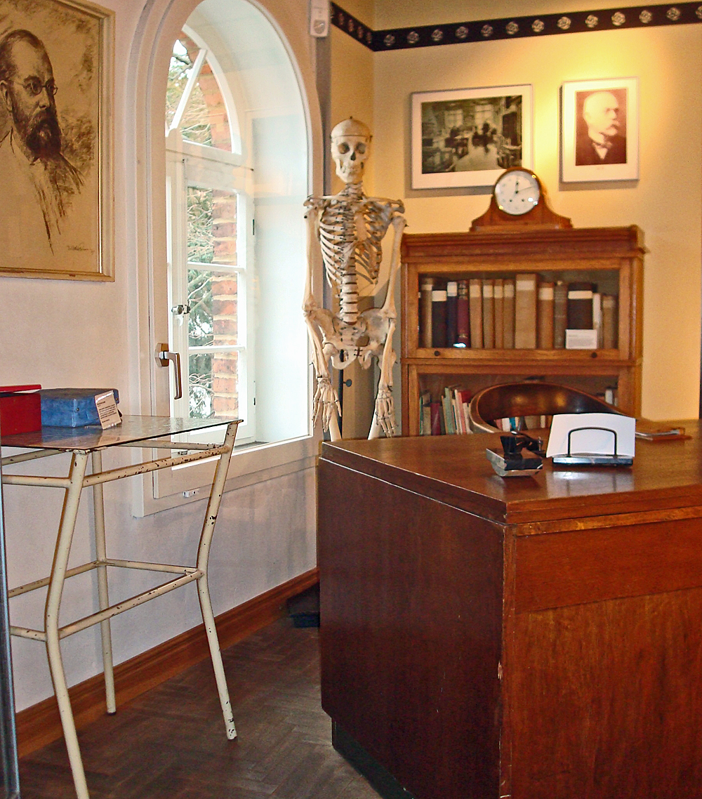 Medizinhistorische Abteilung des Stadtmuseums Gütersloh, Schreibtisch Robert Kochs